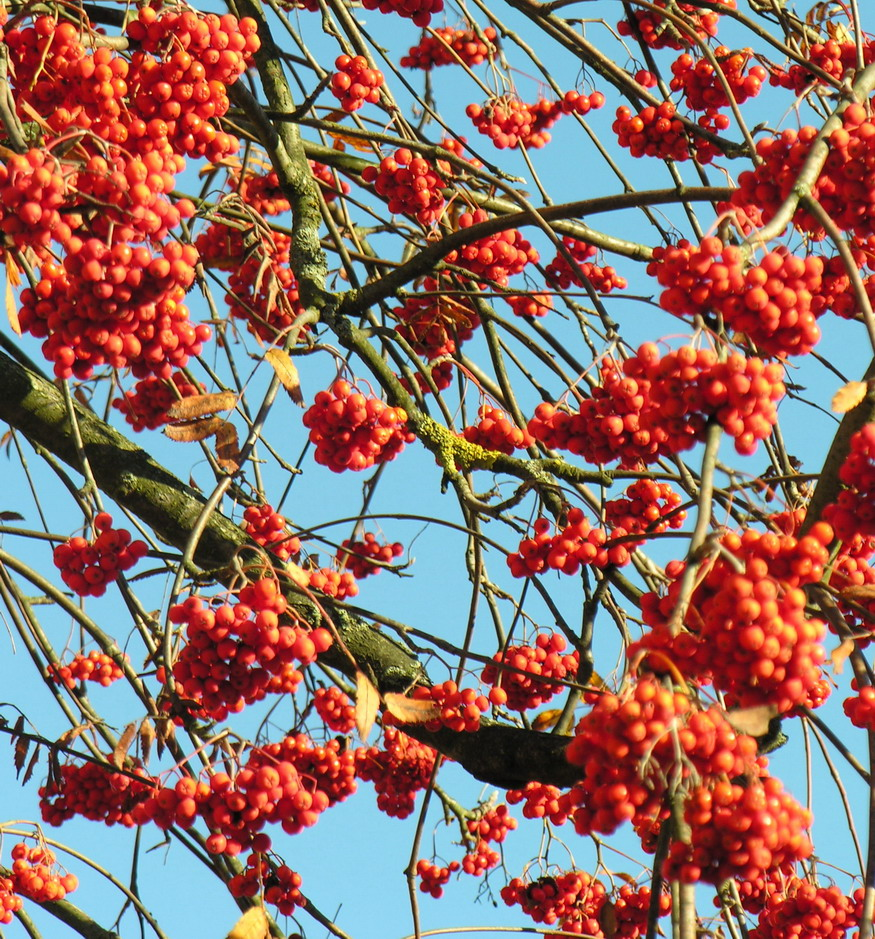 Paprastasis šermukšnis (Sorbus aucuparia) Fam. Rosaceae Foto: Algirdas, 2005 m. spalio 28 d., Lietuva